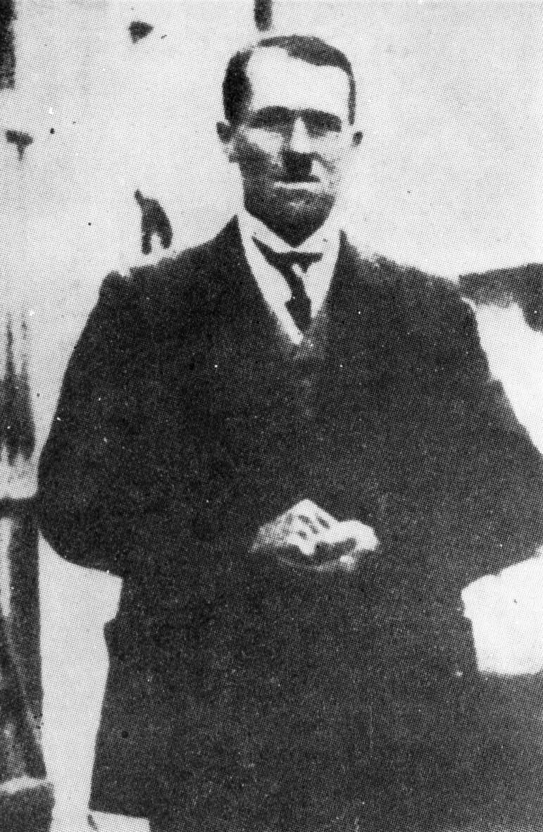 Jan Augustyn